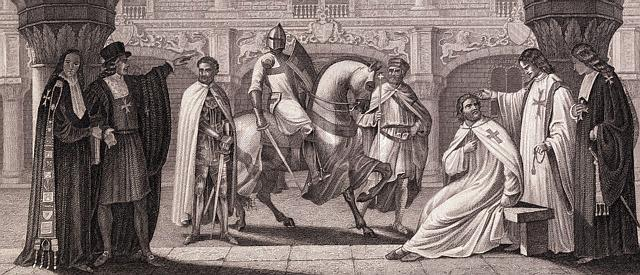 Jacques de Molay and Fulk de Villaret in discussion in 1307